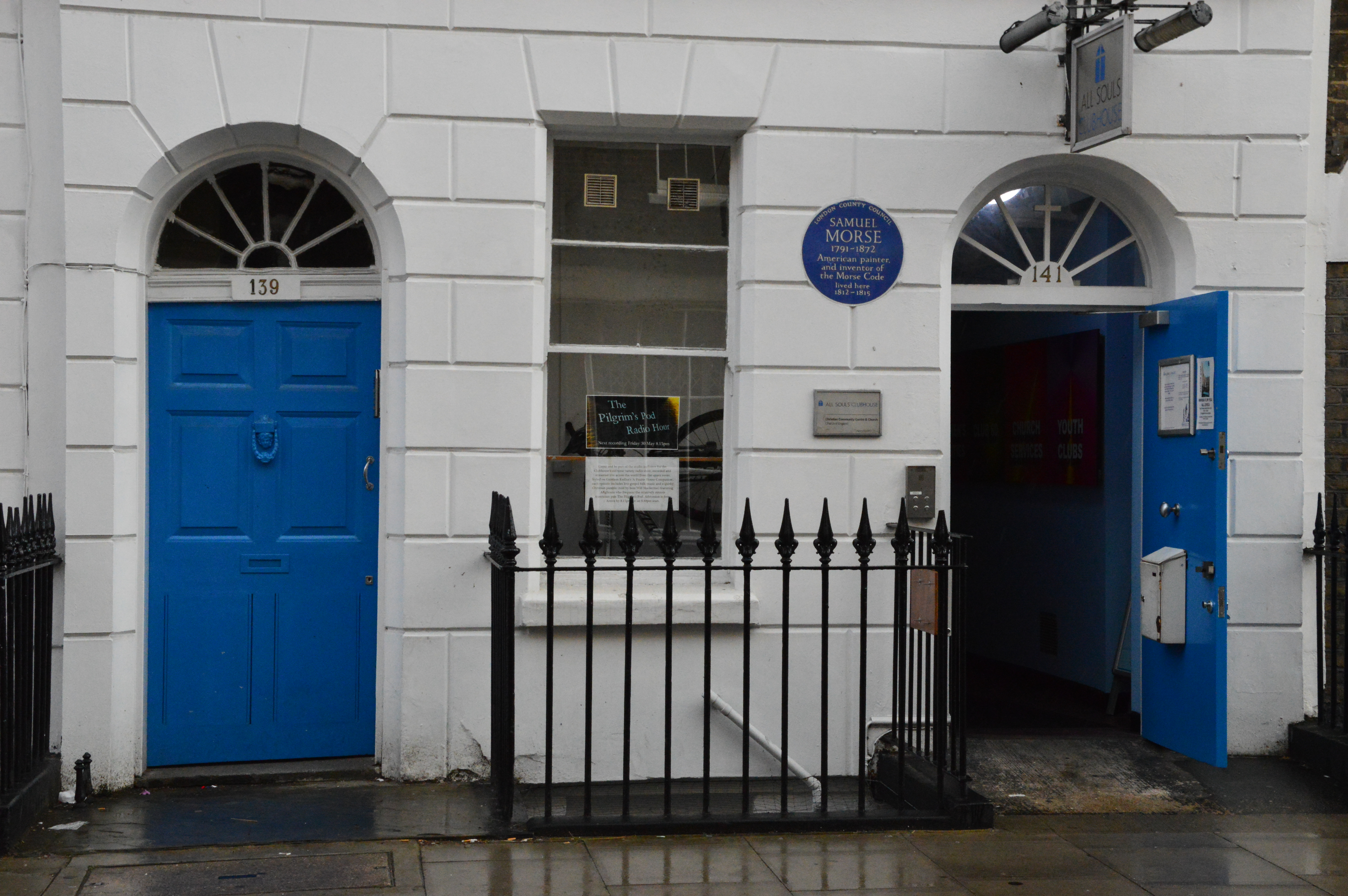 House in London, where Samuel Morse lived in 1812-1815.